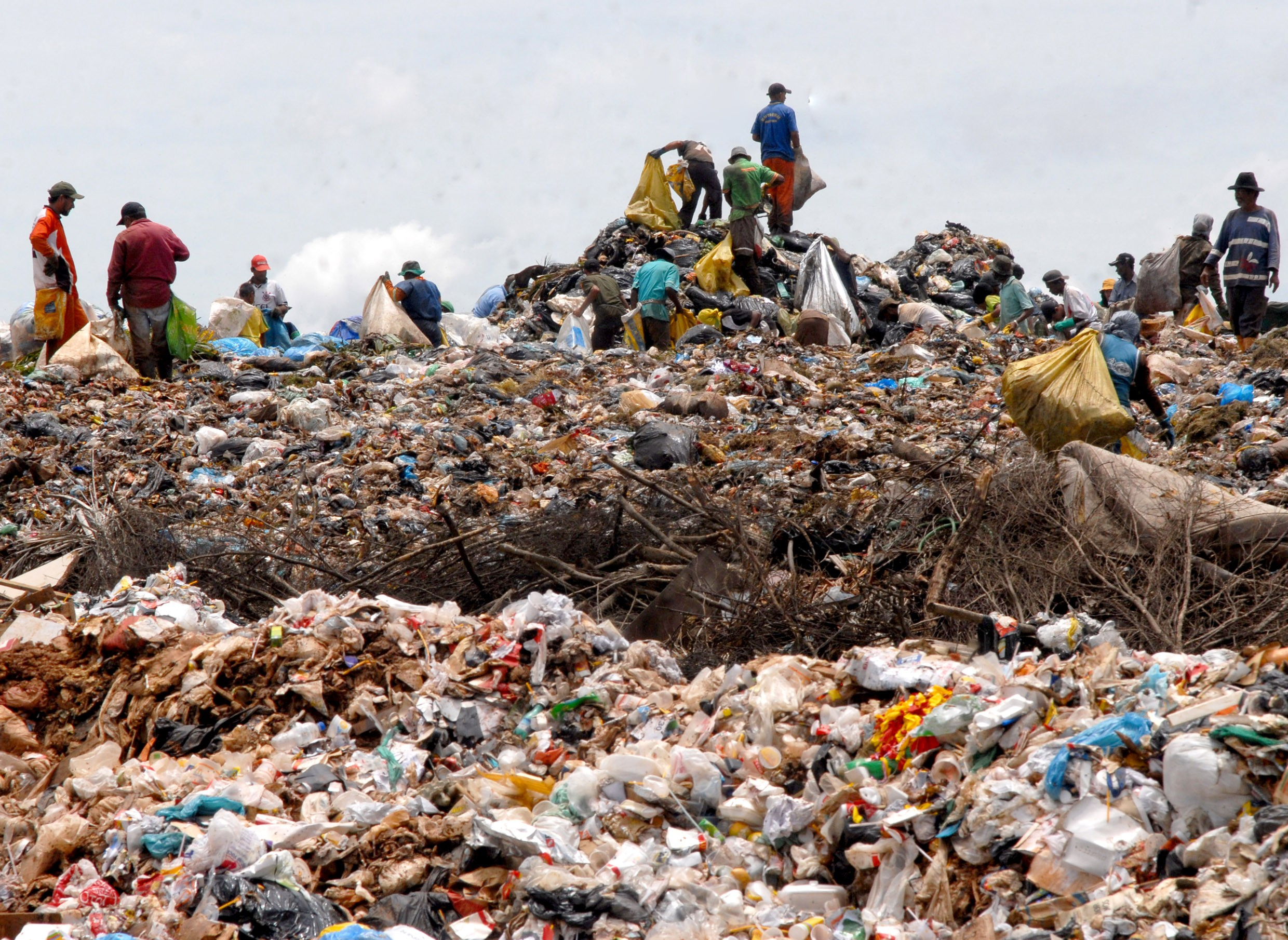 Catadores no Lixão da Cidade Estrutural, DF-BR.